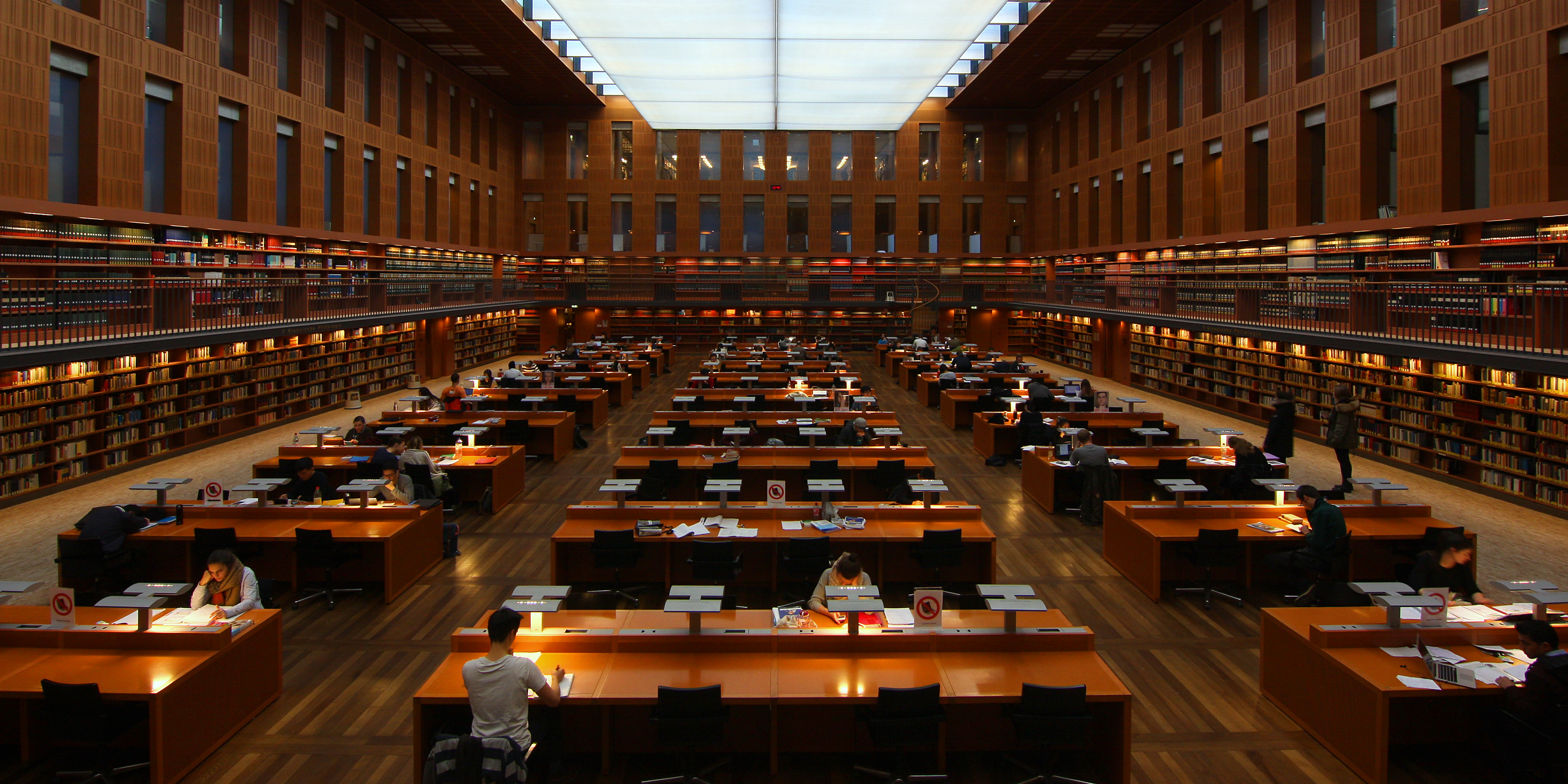 Aufnahme beim WikiLibrary Barcamp 2016.